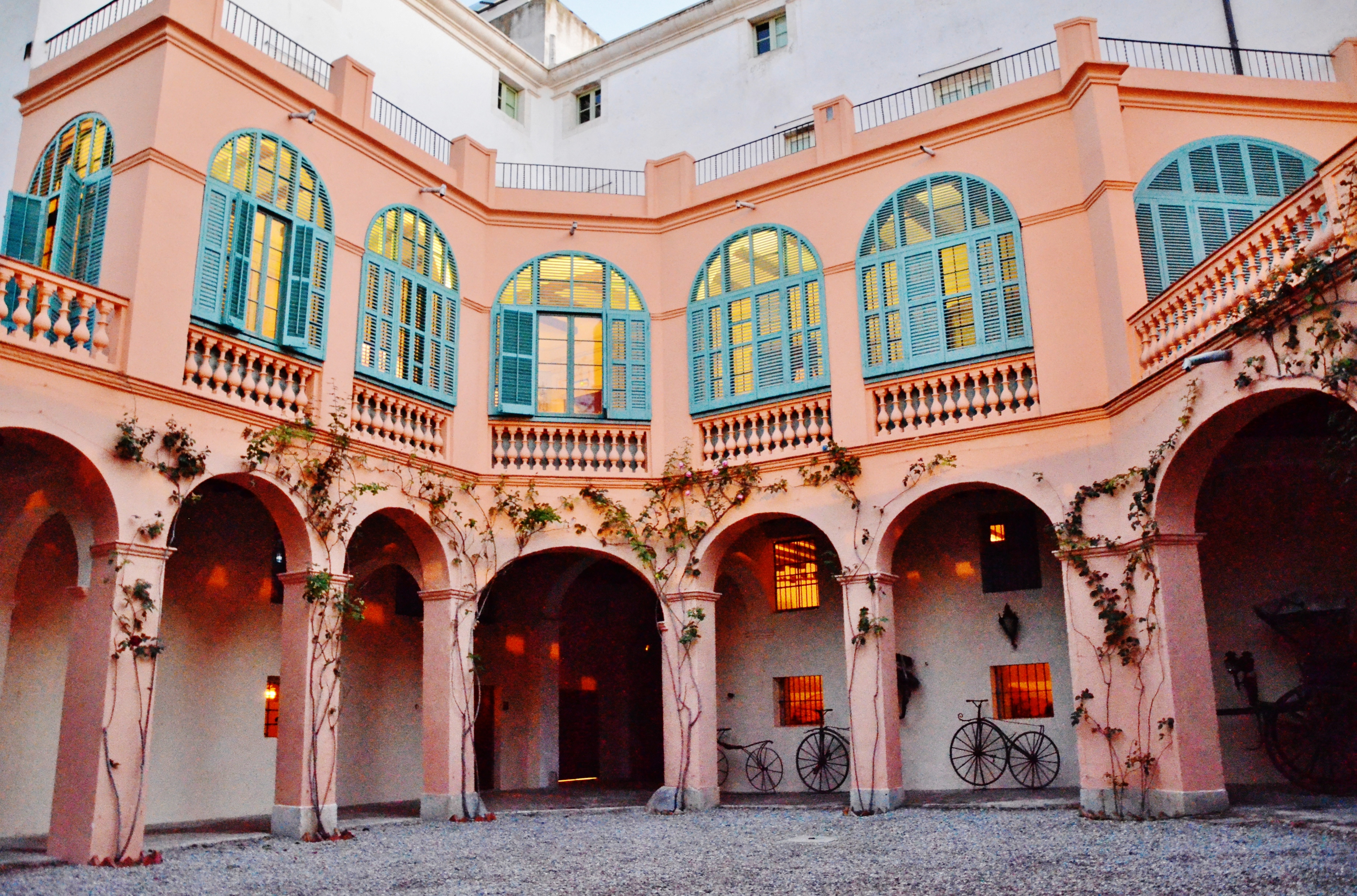 Zona del jardí, Museu Papiol, Vilanova i La Geltrú